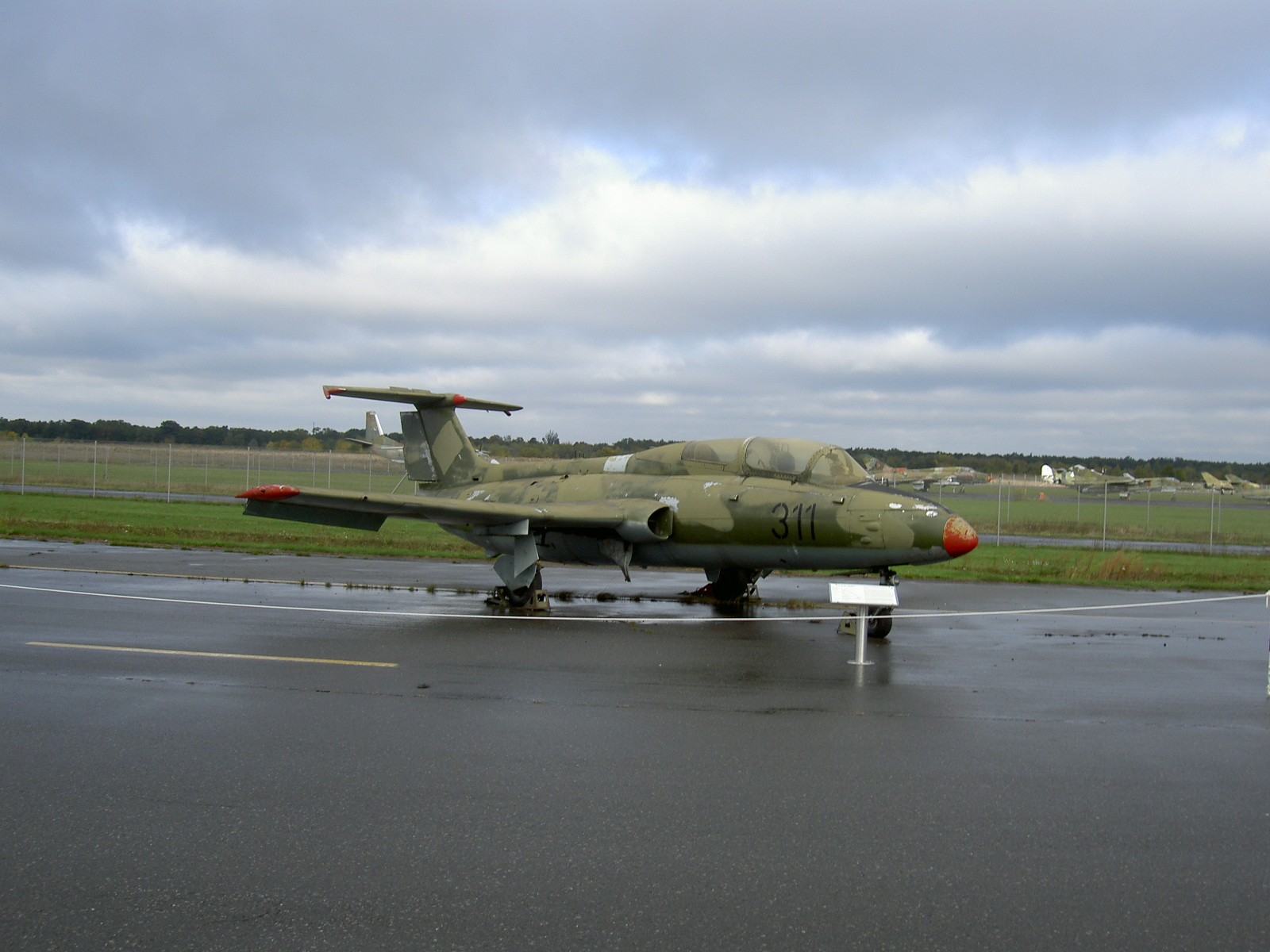 Let L-29 Dolphin 311 im Luftwaffenmuseum Berlin-Gatow